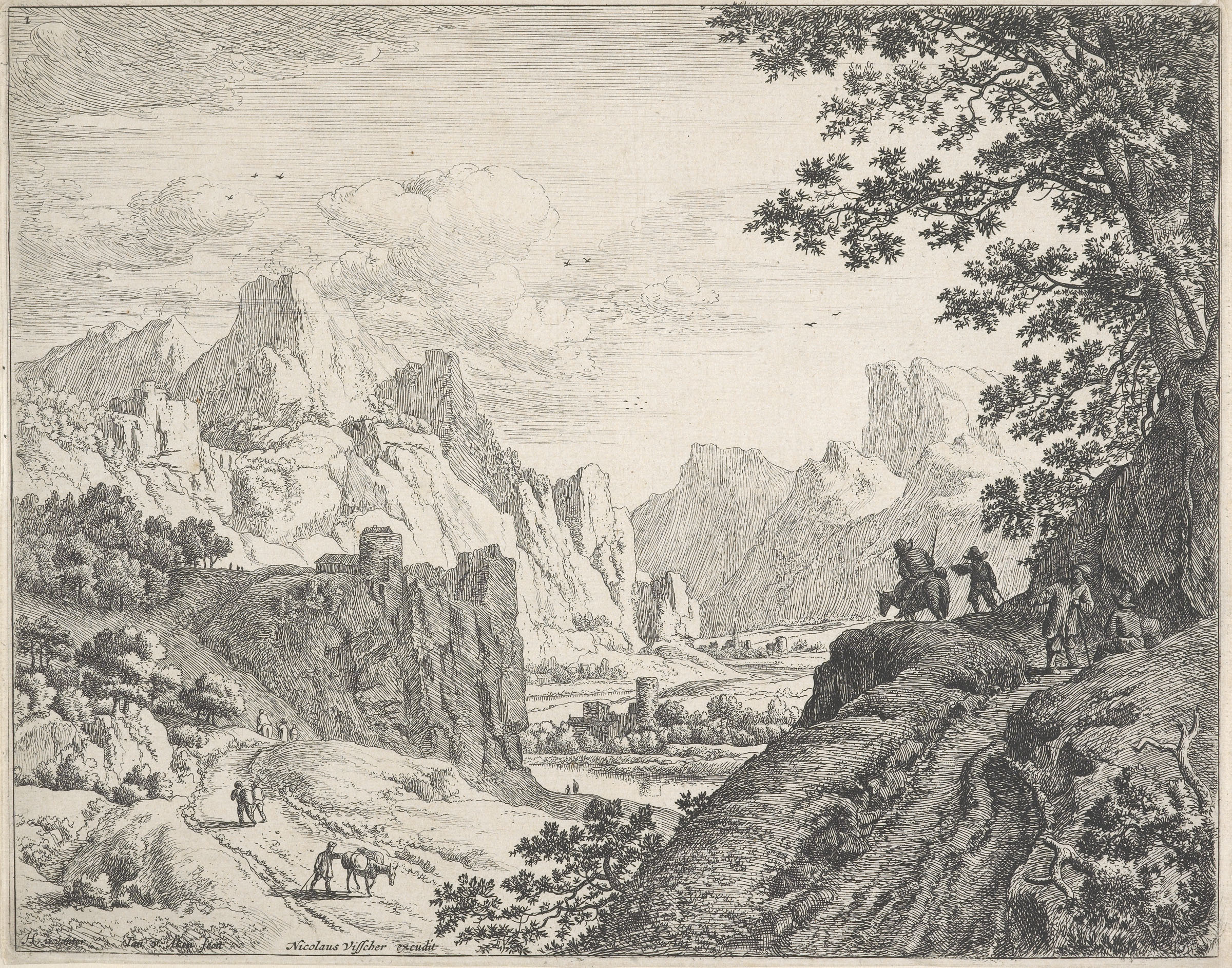 Rijngezicht